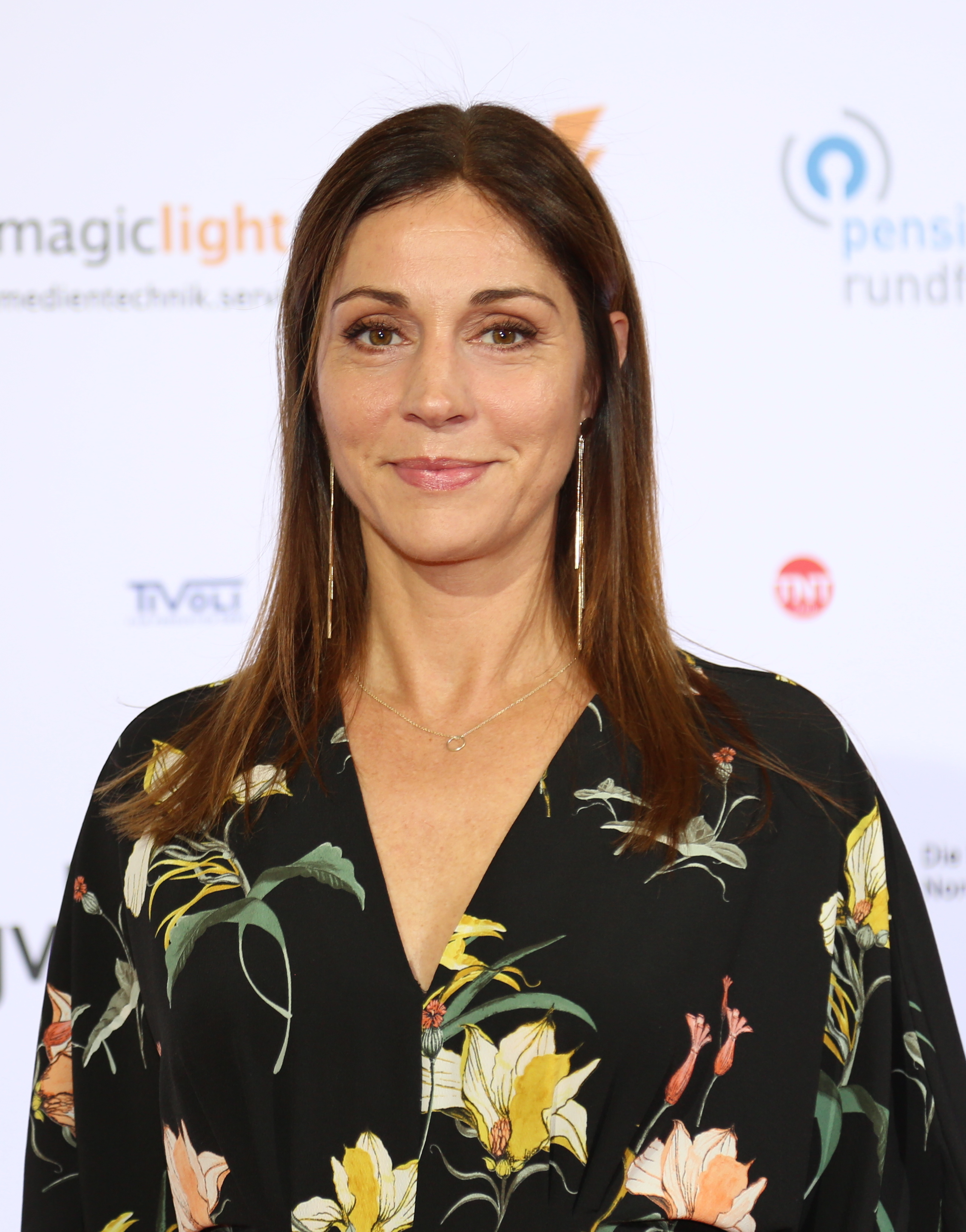 Ulrike C. Tscharre bei der Verleihung der Auszeichnungen der Deutschen Akademie für Fernsehen (DAFF) 2017.